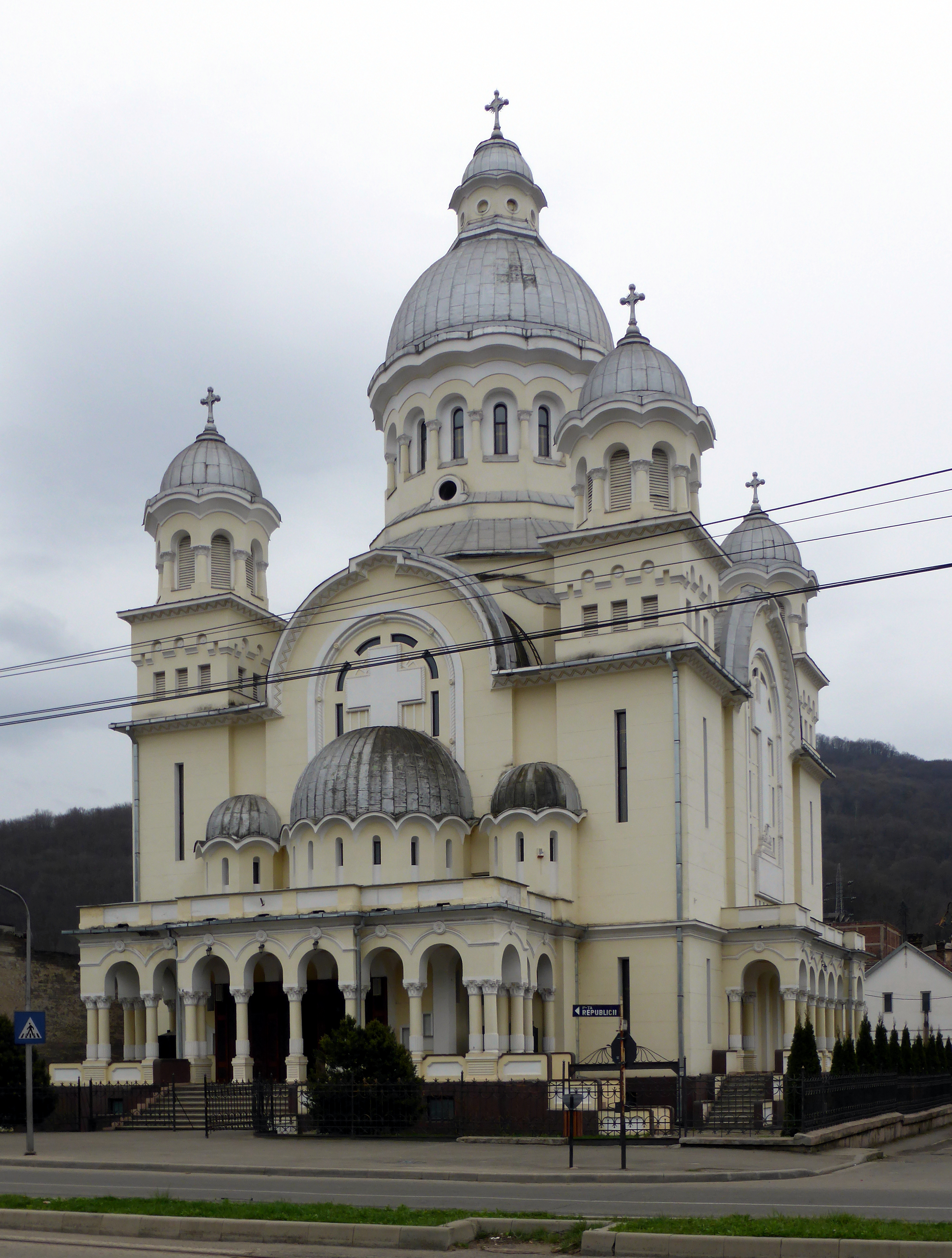 Kirche „Mariä Entschlafen“ in Reschitz (RO).